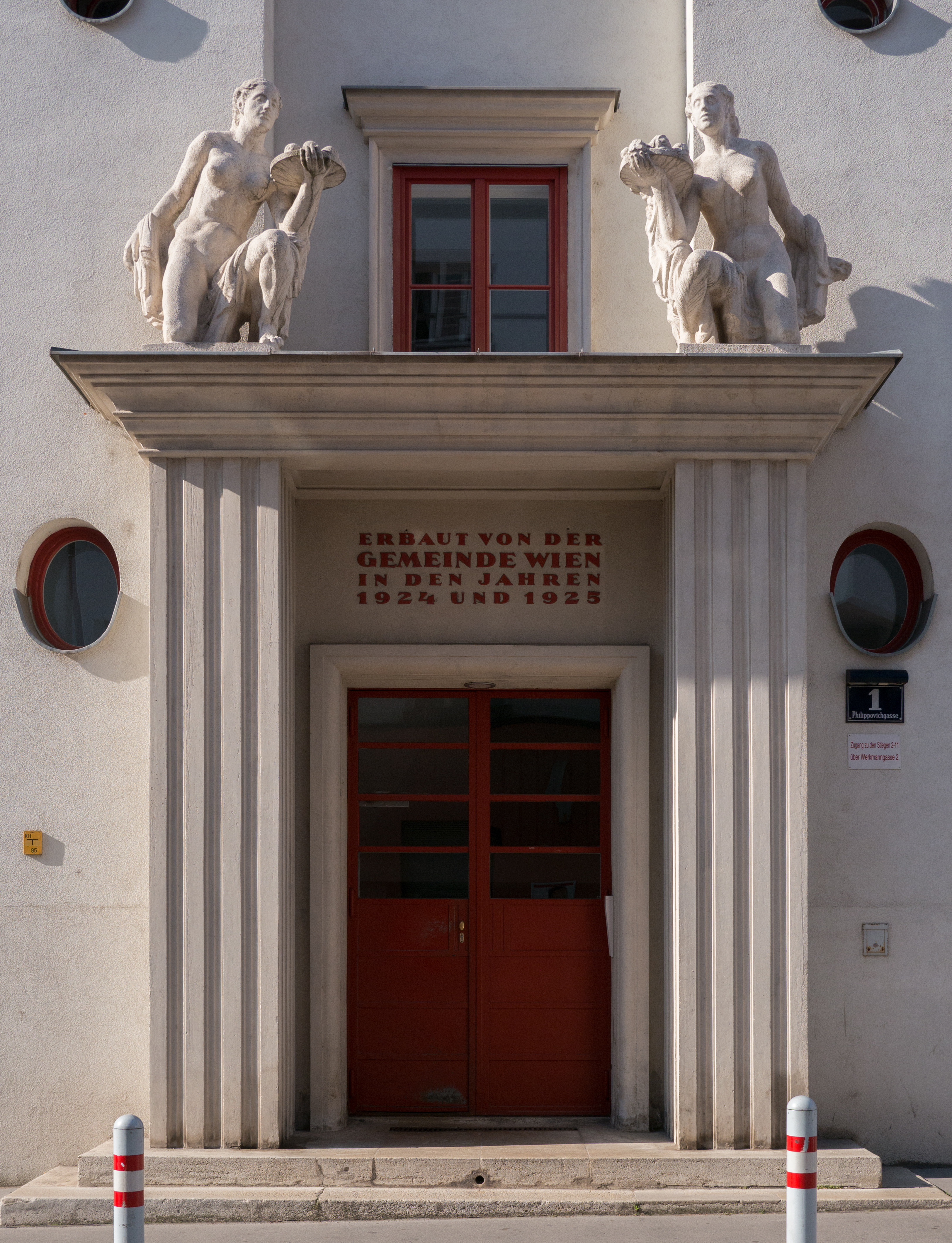 Klosehof